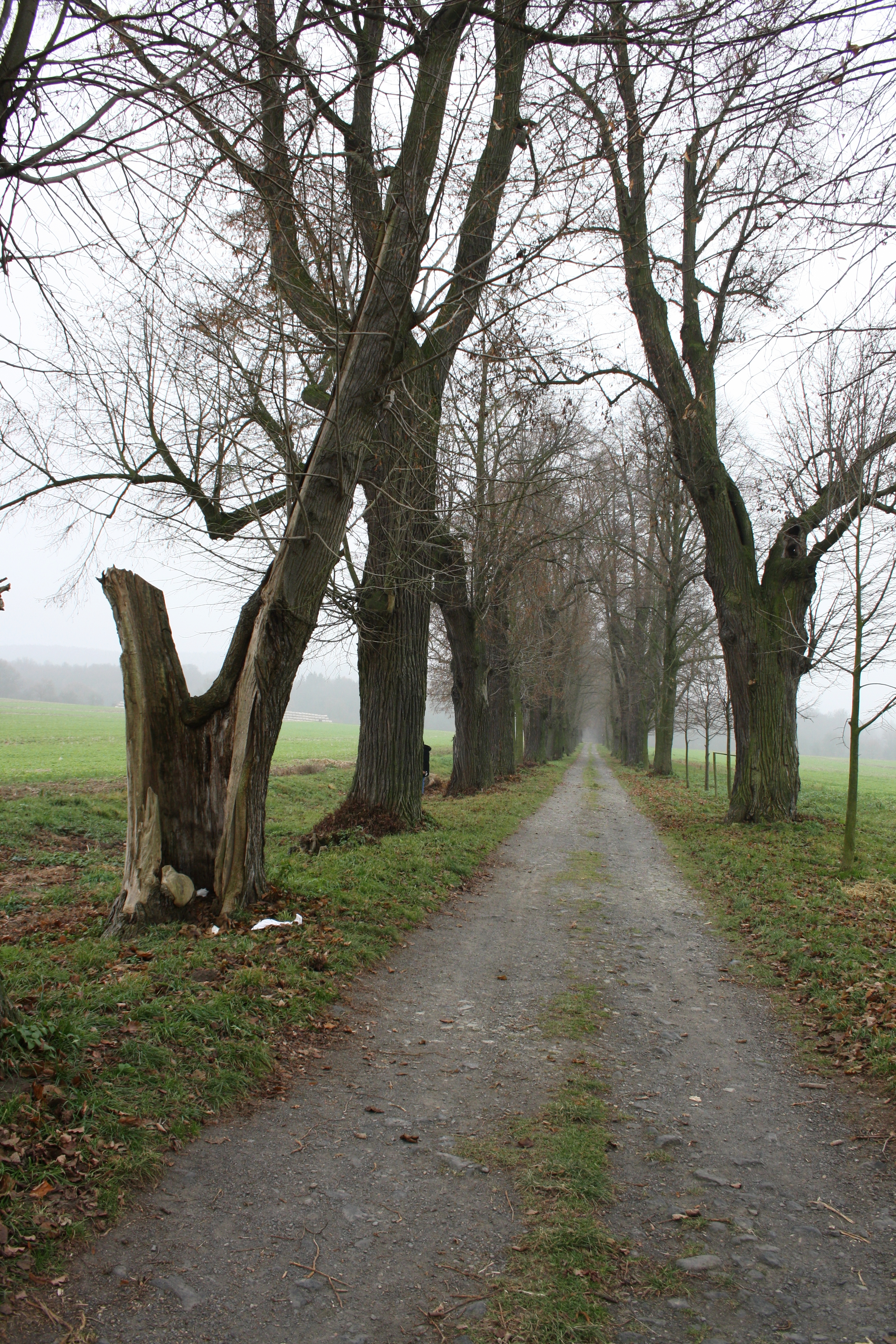 Zahrádky - Valdštejnská alej